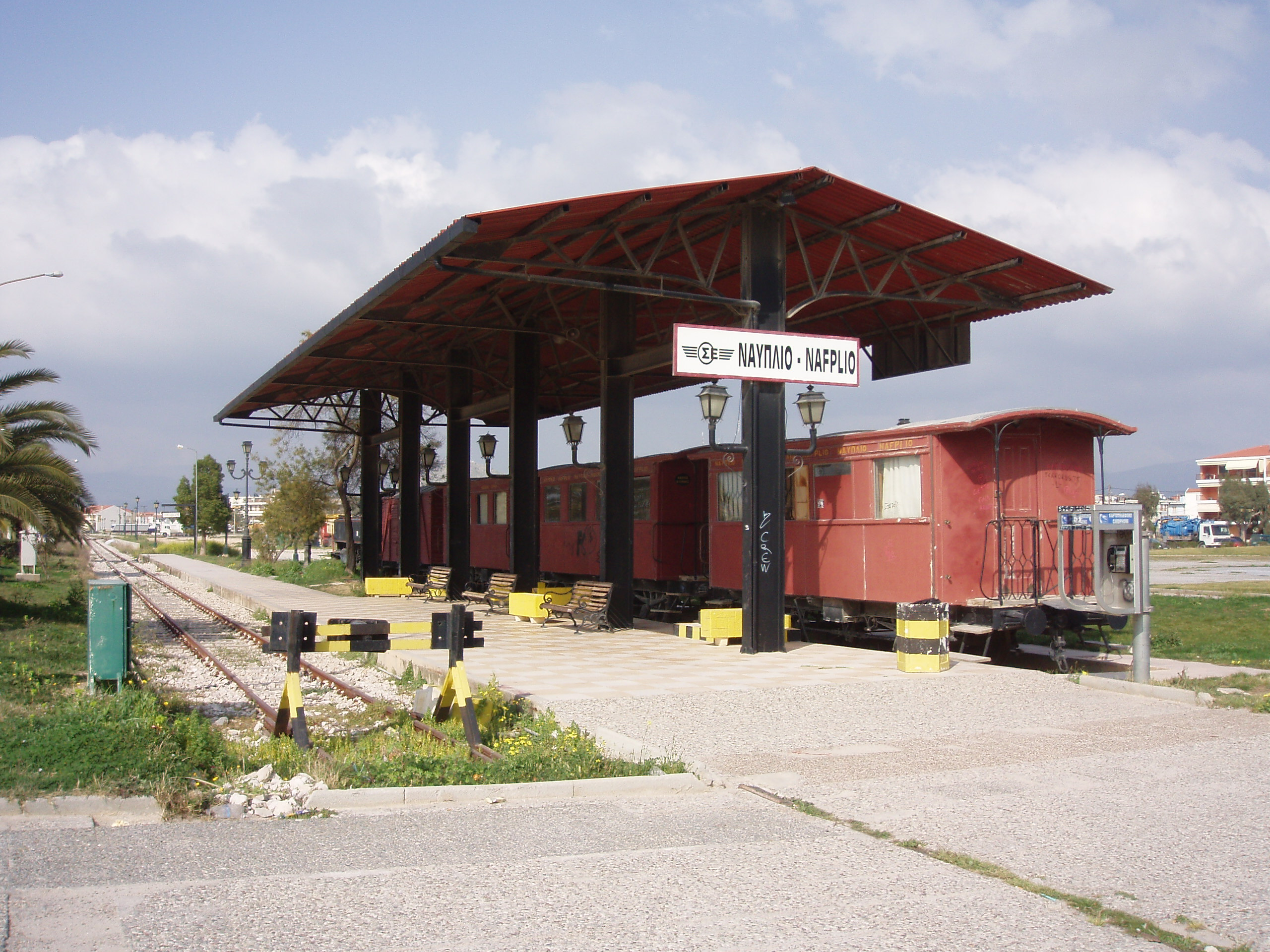 Bahnhof von Nauplia